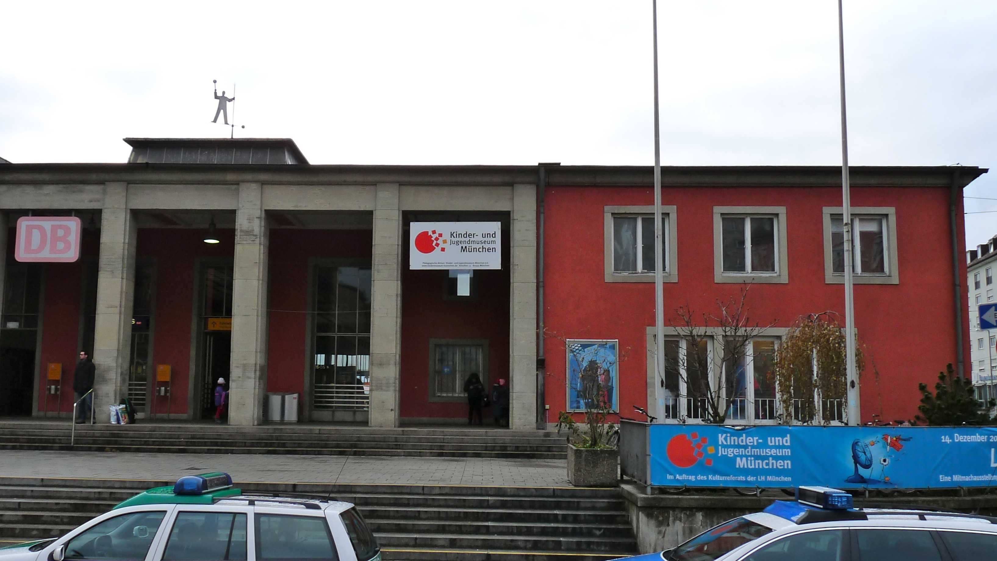 Außenansicht des Münchner Kinder- und Jugendmuseums.